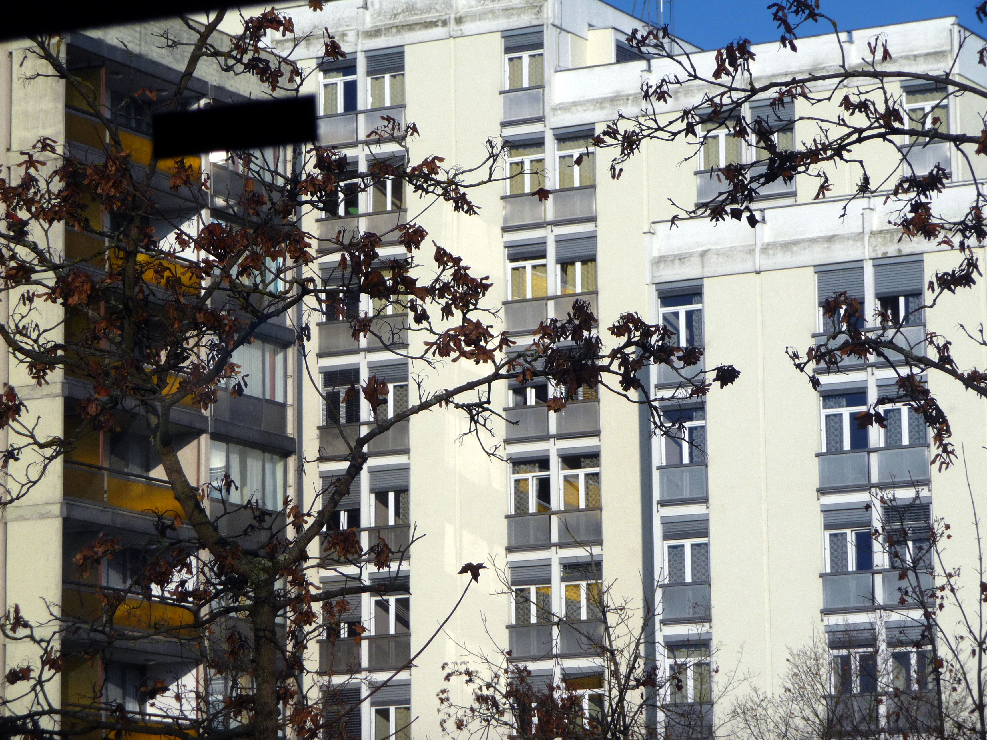 Radenci_0062